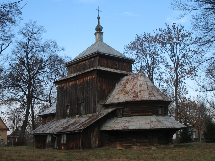 Leżachów (Poland), Greek Catholic church